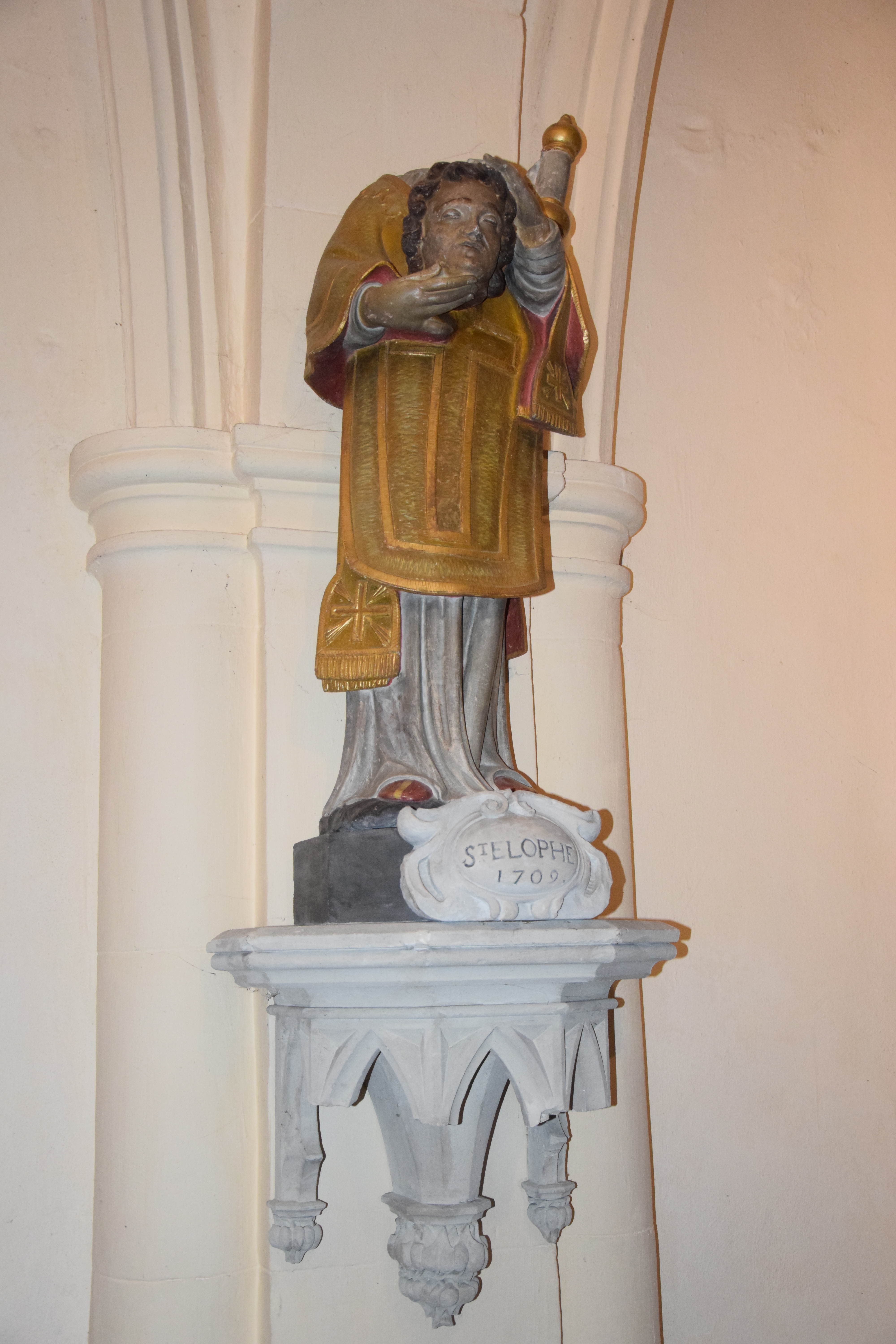 Église Saint-Rémy de Domrémy-la-Pucelle